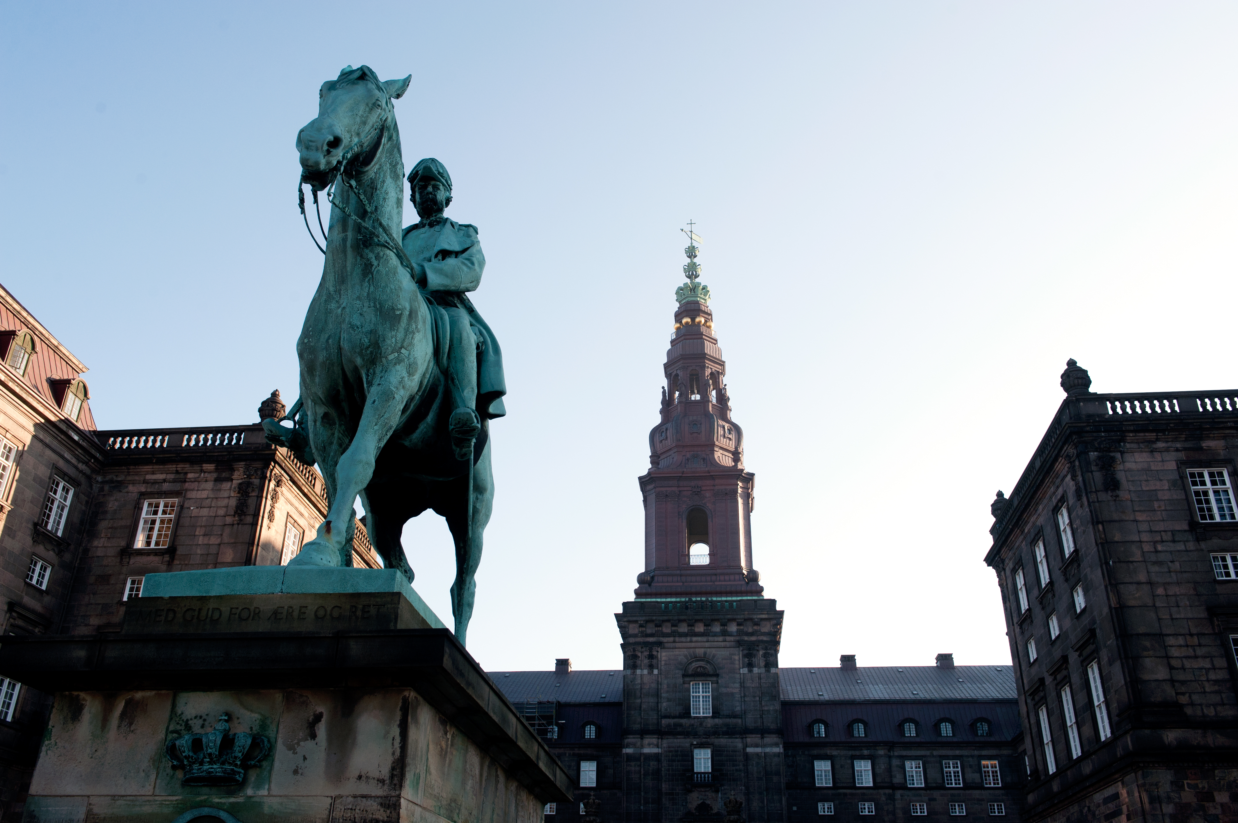 Christiansborg Köpenhamn Danmark Data-uid: 950a9c8f-a516-4700-a346-f1f5bac4fcb0